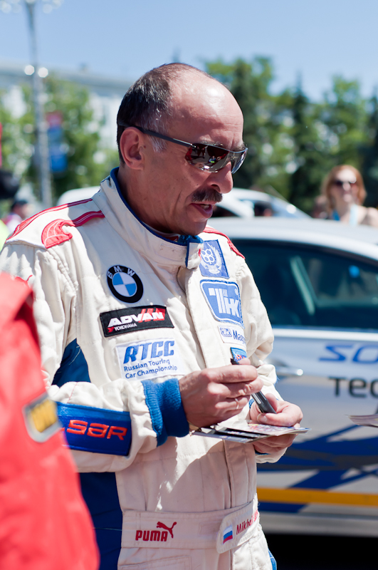 Михаил Ухов, автограф сессия, 5 июня 2011 года, этап "Курская Дуга", Курск.